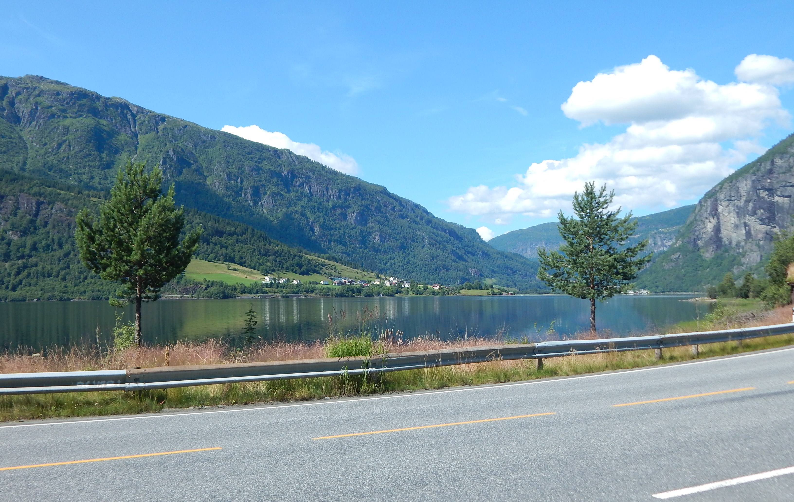 Riksvei 13 langs Granvinsvatnet